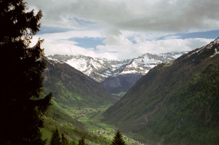 Bergwald in der Schweiz bei Engi